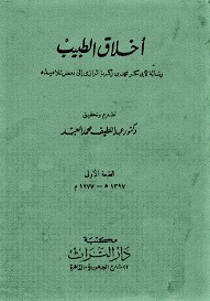 غلاق كتاب أخلاقيات الطبيب